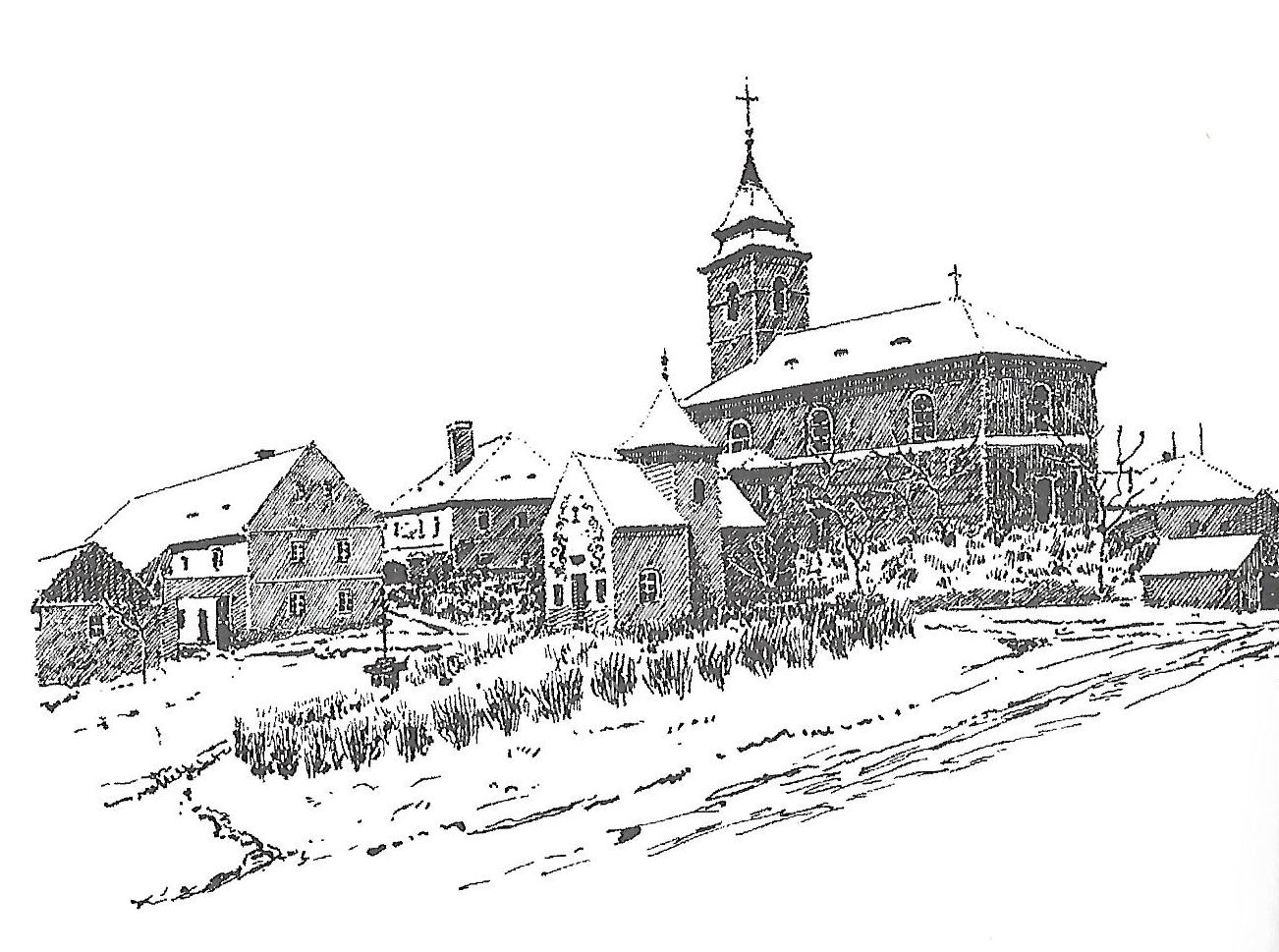 Kostel sv. Michaela v Chožově v roce 1929, kreslil Bohumil Lůžek